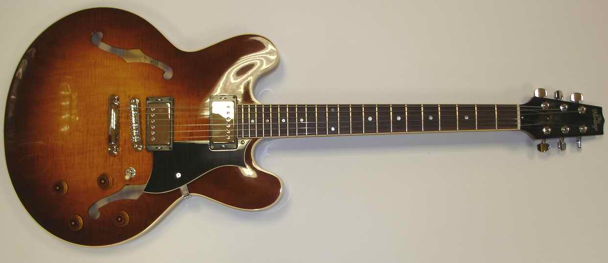 eigen foto